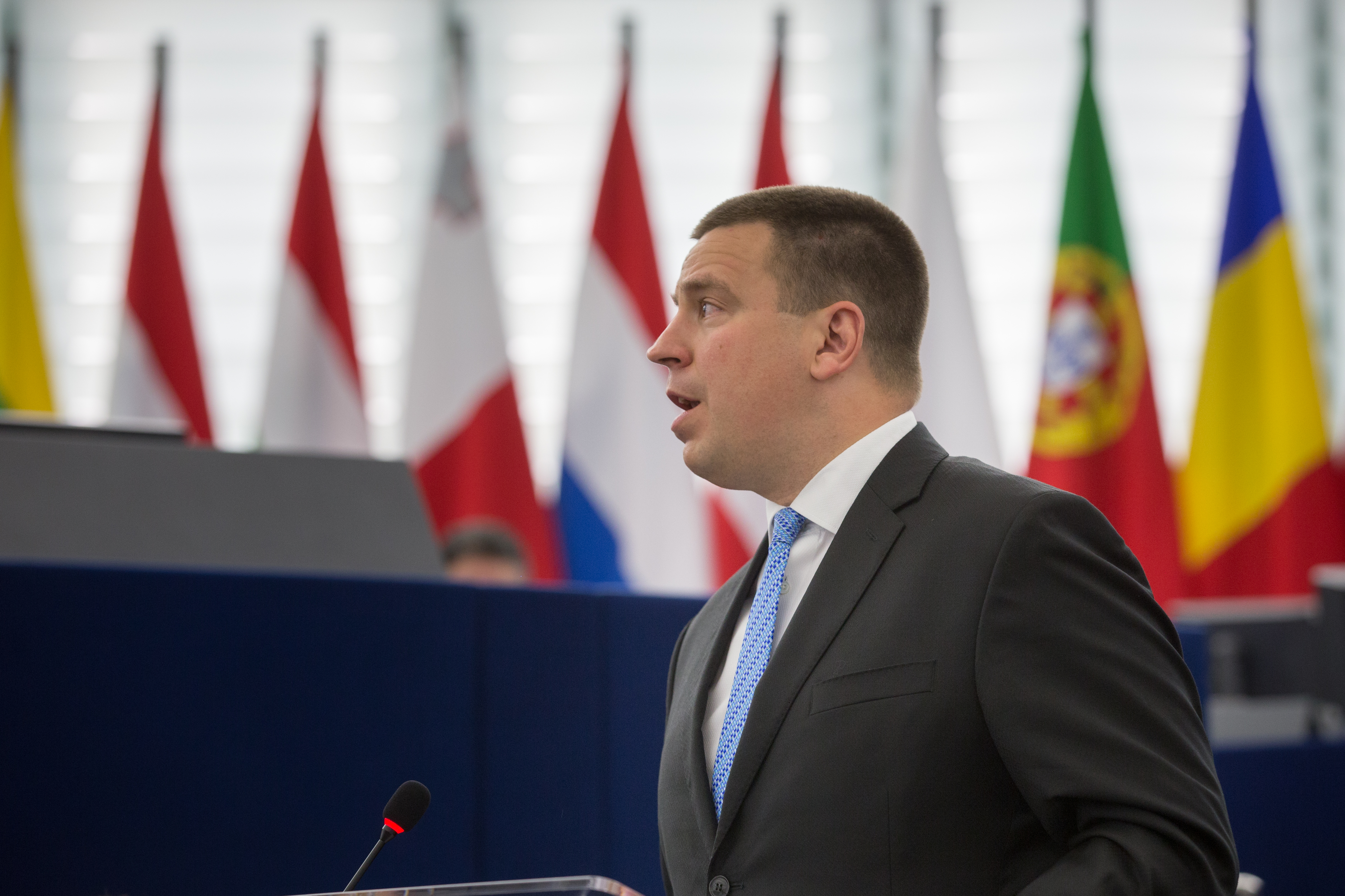 Jüri Ratas tutvustab Euroopa Parlamendis eesistumise programmi